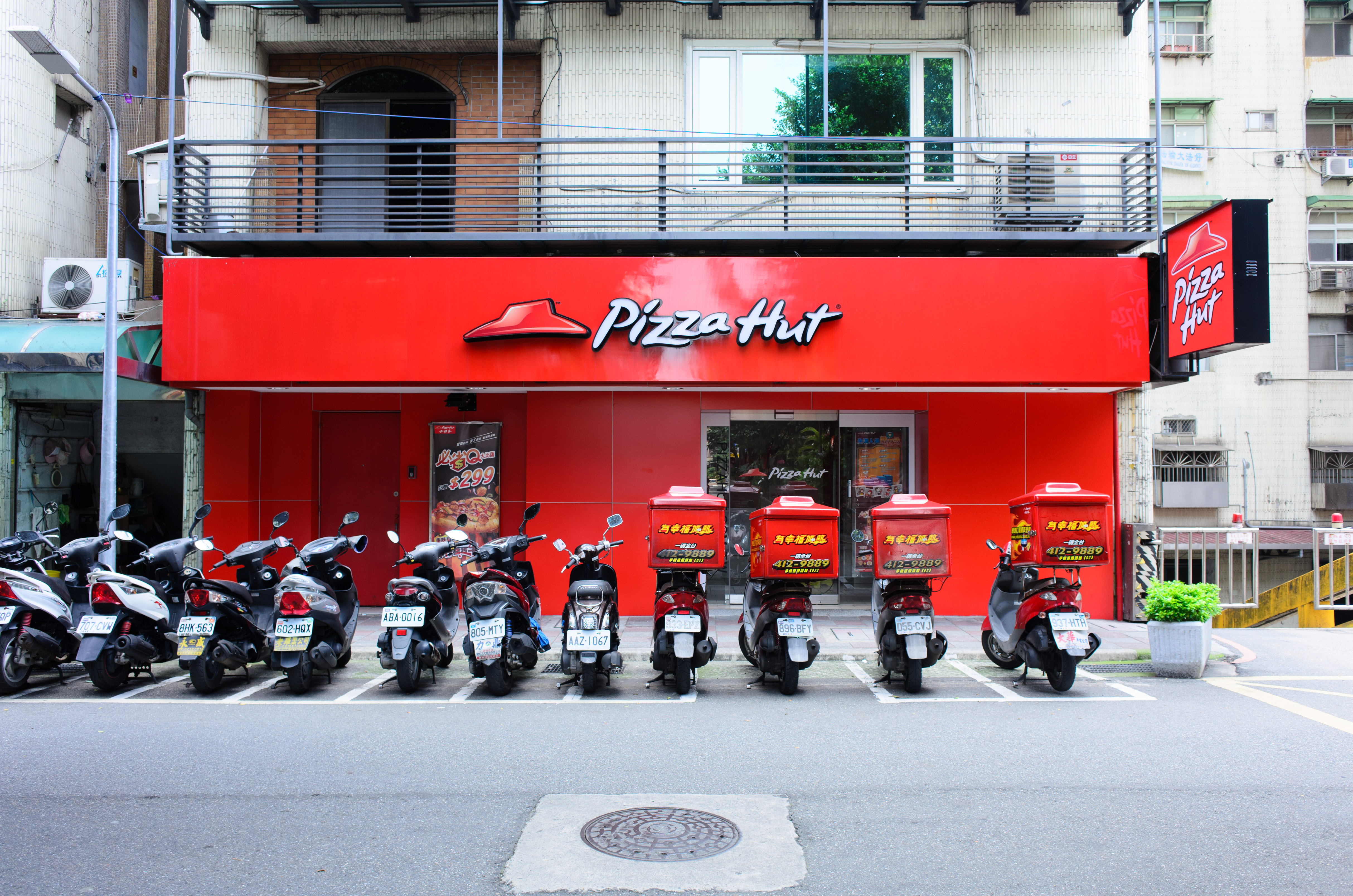 中文（台灣）: 必勝客民生外送店，地址：臺北市松山區民生東路五段138巷5號。